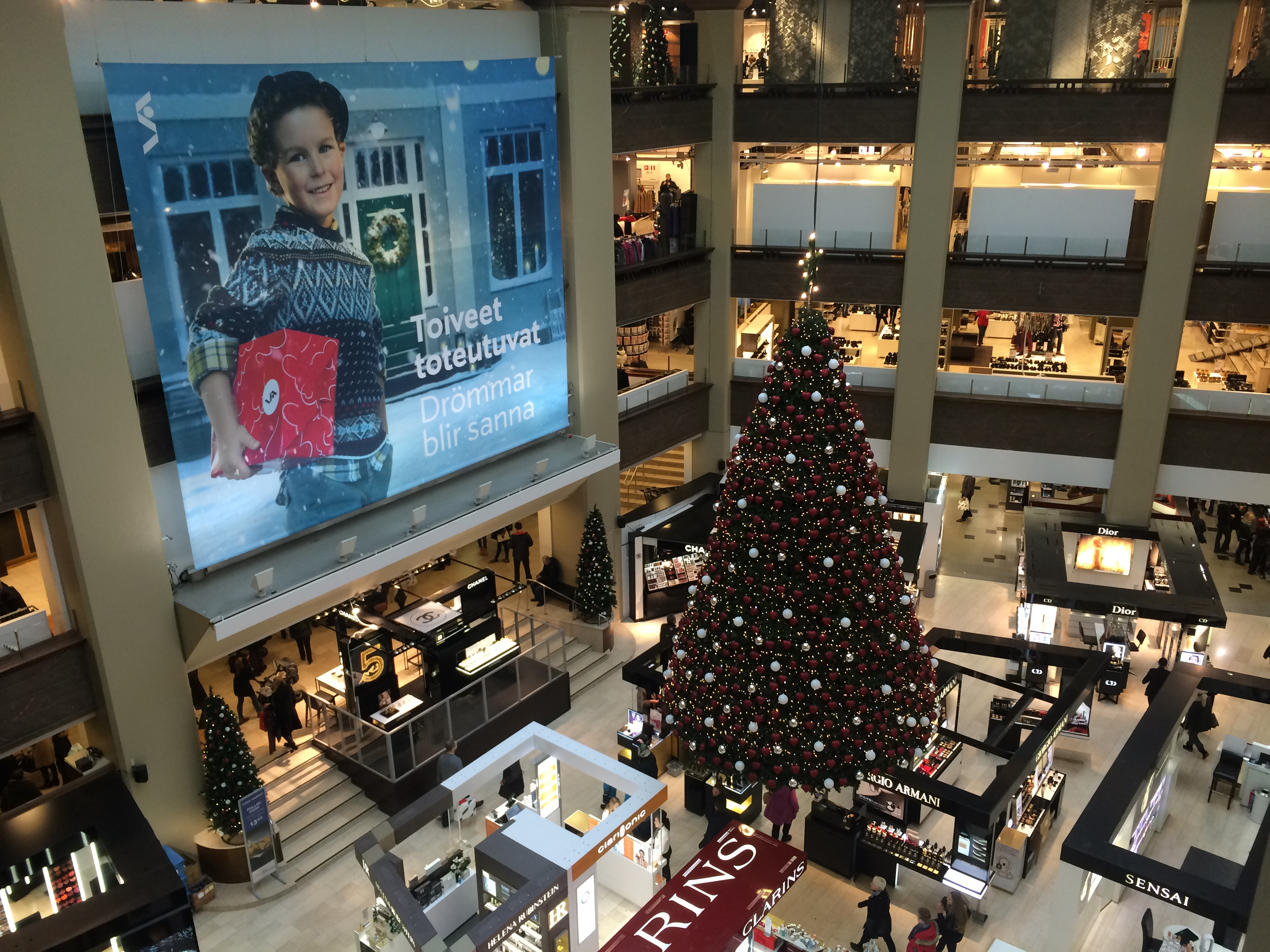 Helsingin Stockmannin joulukoristeet 2014.